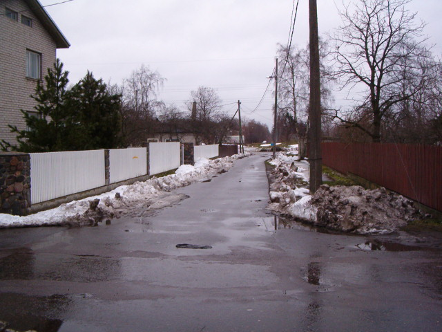 Algi tänav